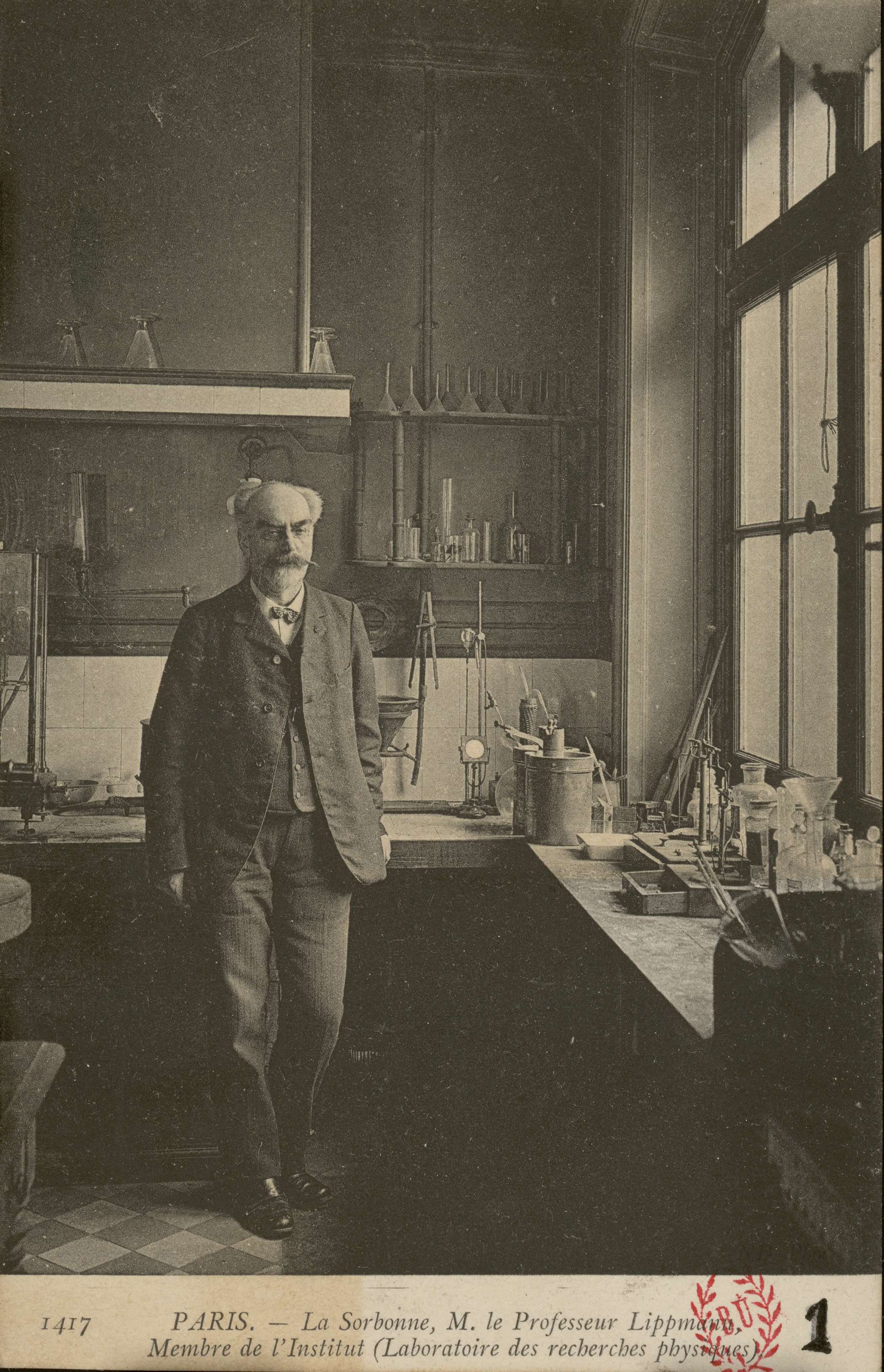 Carte postale photographique